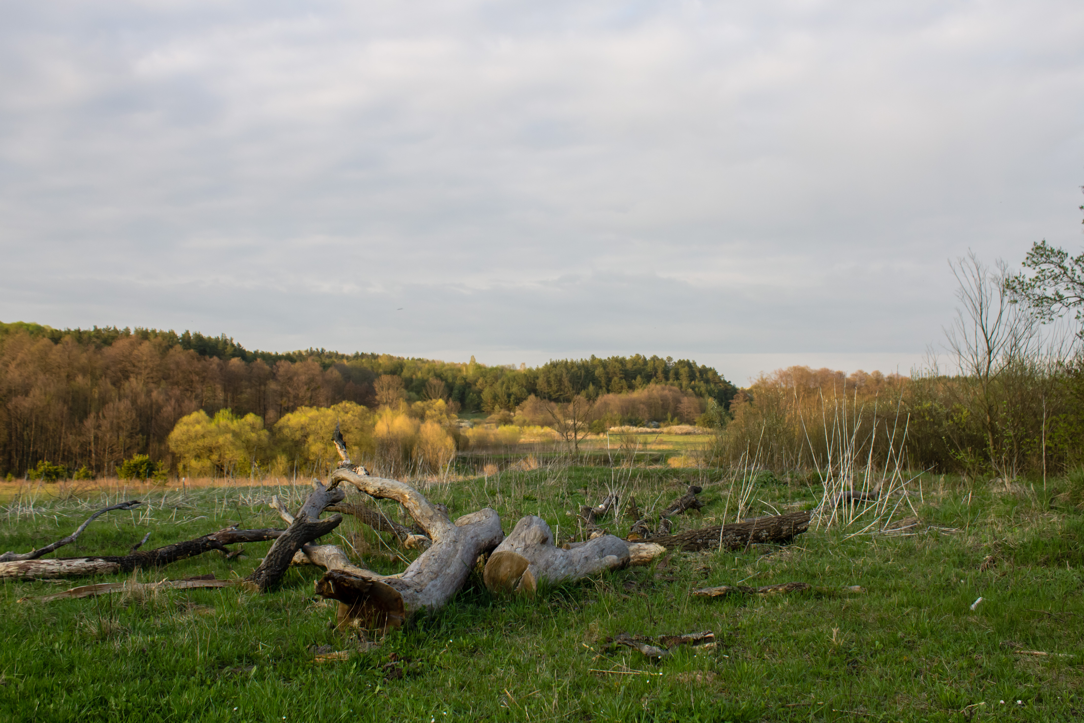 Гурби, Здолбунівський район Мостівське л-во: кв. 58, 59 вид. 1-19, 21-24